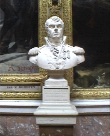 Buste de la galerie des batailles du château de Versailles. Oeuvre de Jean-Baptiste-Joseph Debay (père ou fils ?)